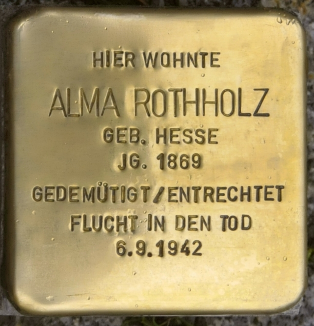 Stolperstein für Alma Rothholz in Eisenberg (Thüringen), Burgstr. 13